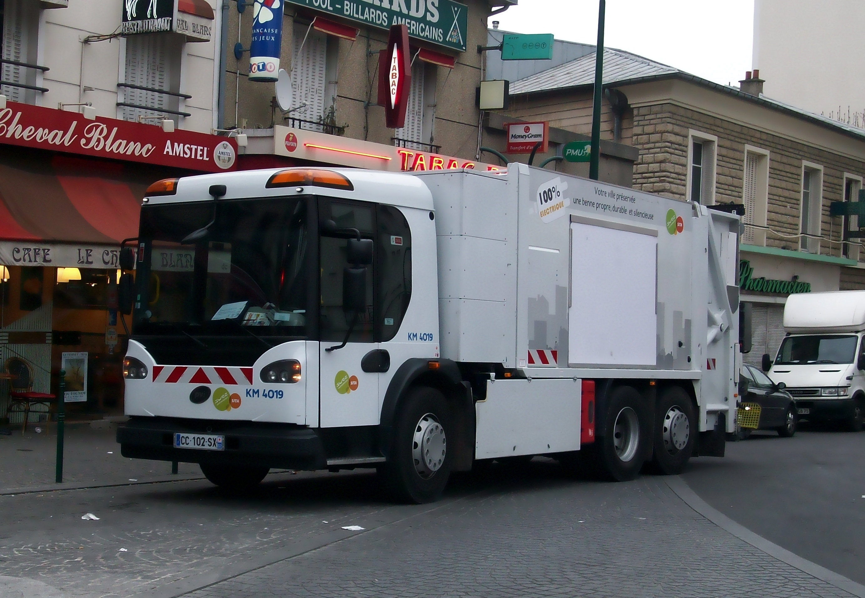 Véhicule PVI de collecte des déchets de Suez Environnement Sita, à Colombes